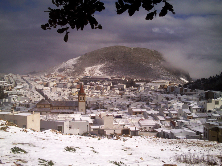 Nieve en Teba 28 de febrero del 2013